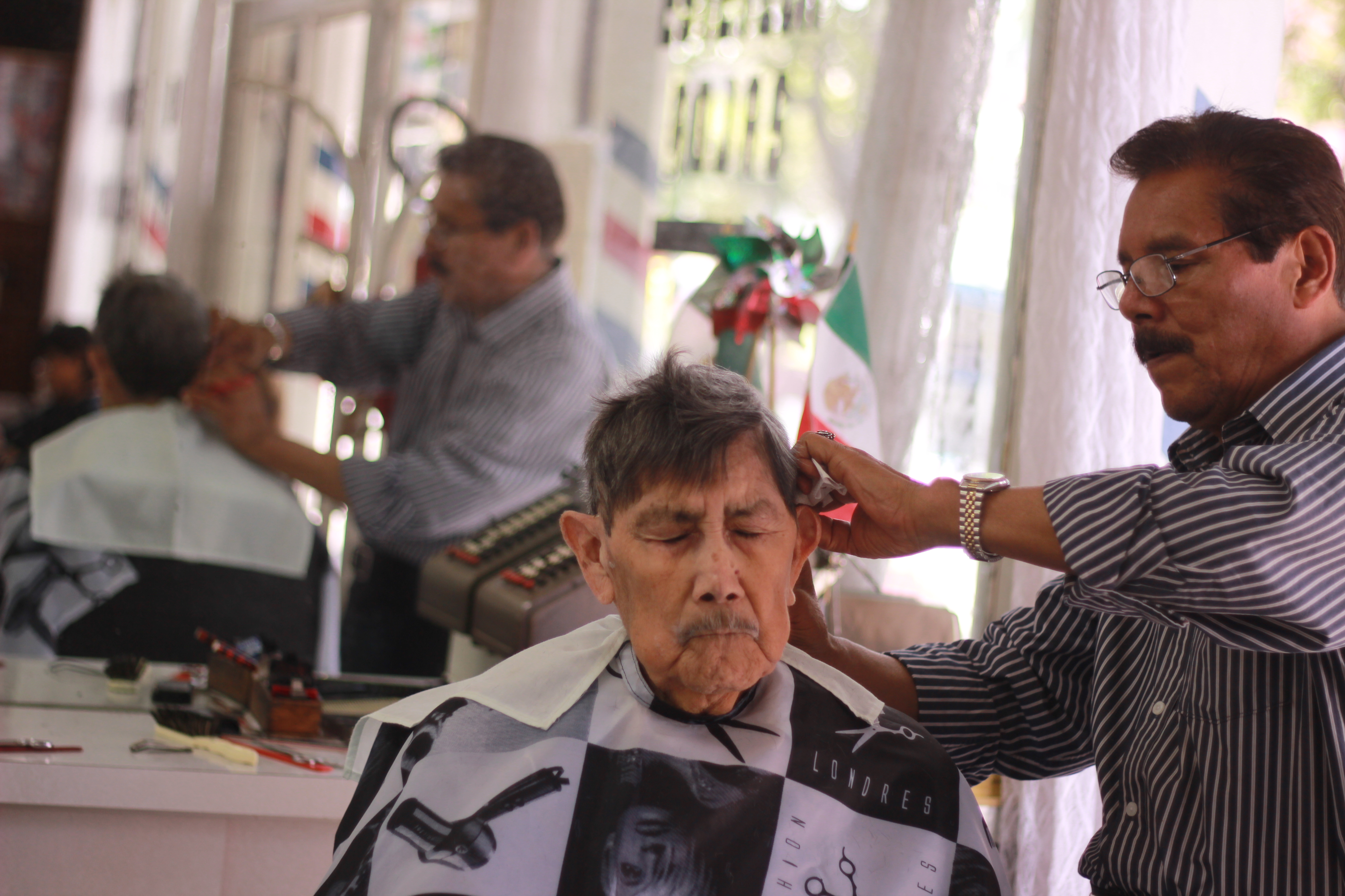 Barbería tradicional en la Ciudad de México. Un barbero corta el cabello a un señor. Se observa una adorno con la bandera de México en el fondo.